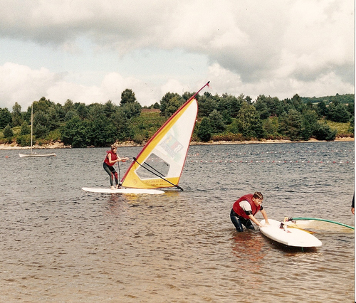 Lac de Vassivière planche à voiles